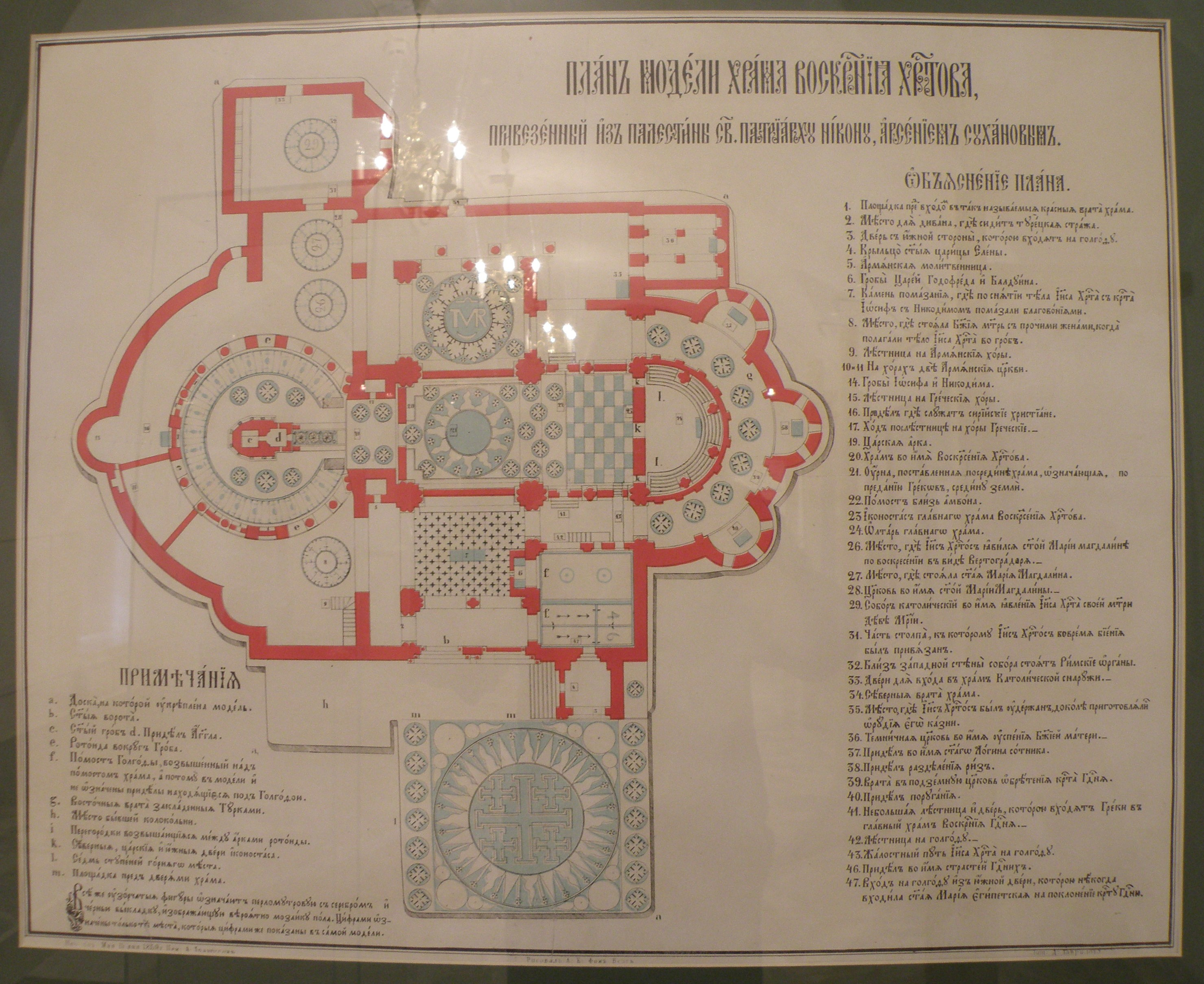 План модели Храма Воскресения Христова, привезенный из Палестины св. патриарху Никону Арсением Сухановым